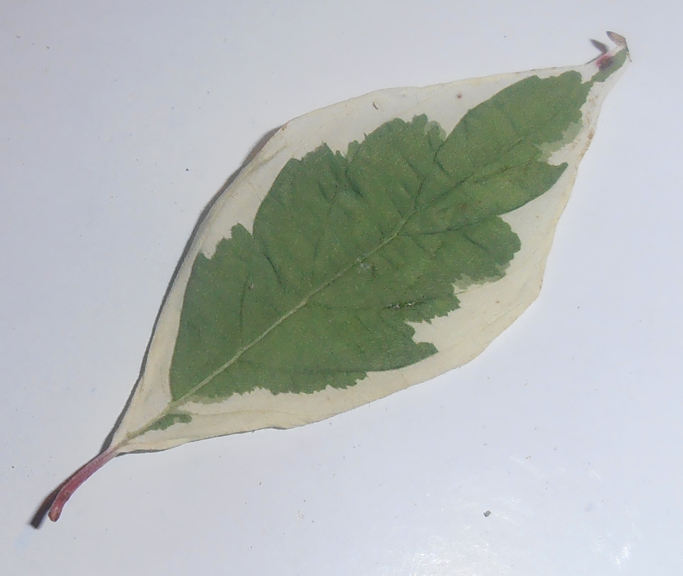 Dereń biały 'Ivory Halo'